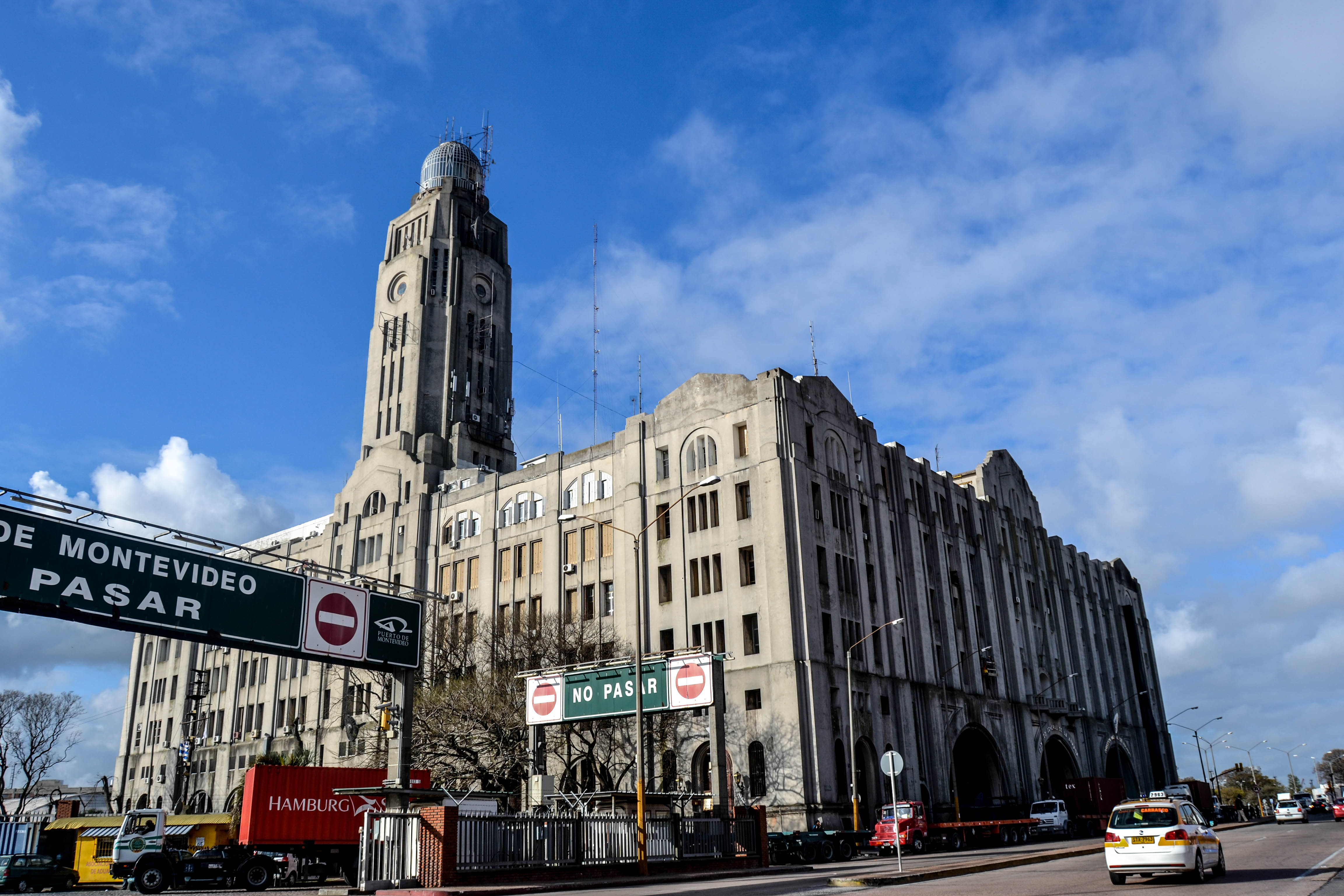 Edificio Aduana de Montevideo. Ubicada en el departamento de Montevideo